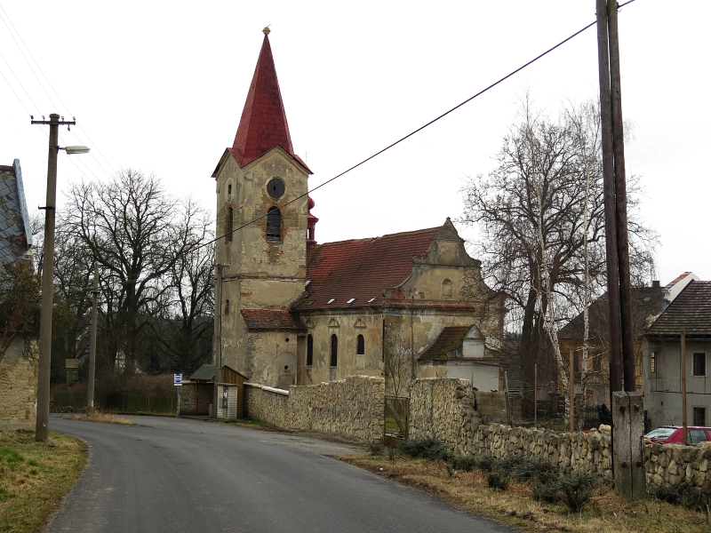 Kostel svatého Martina, Robeč.